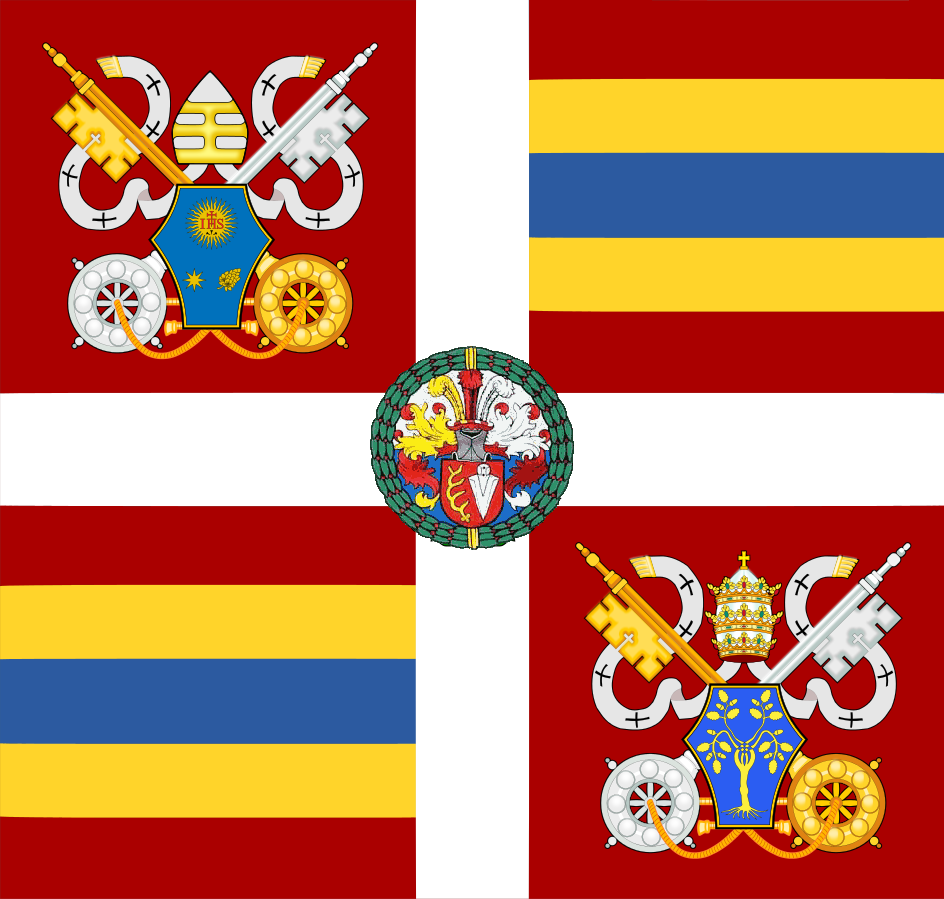 Bandiera della Guardia Svizzera Pontificia sotto il comando del colonnello Cristoph Graf. Werner Affentranger, Fahne Gardekommandant Graf (Gardefahne) (2015)